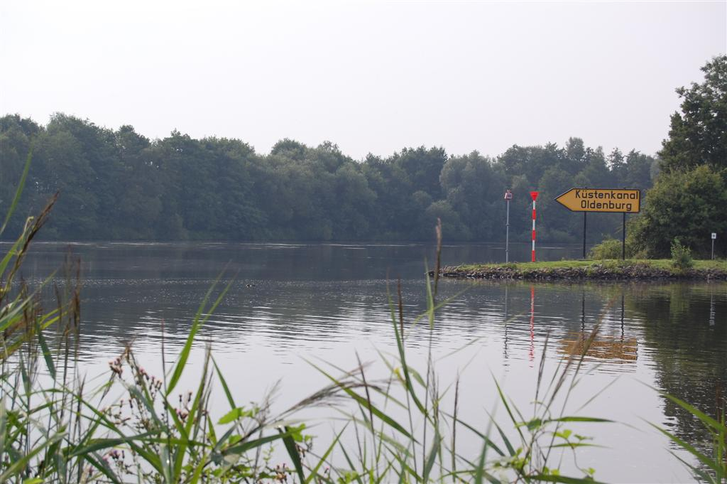 Het Kustenkanal-Oldenburg op de kruising met de Eems.